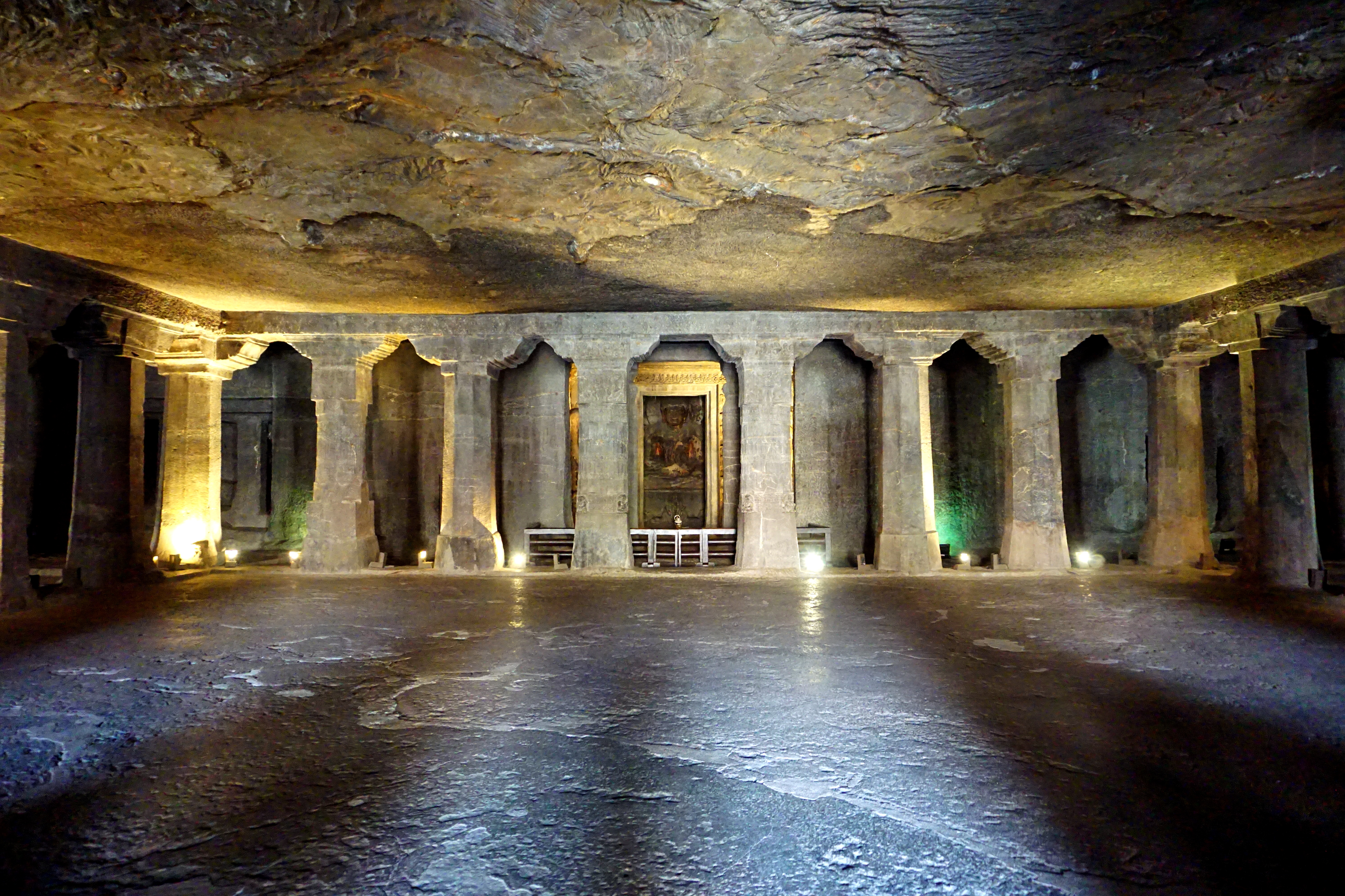 Ajanta Caves, Aurangabad, India